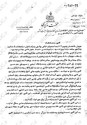 نامه ساواك خراسان نیز در خصوص تأسیس " كانون بحث و انتقاد دینی "